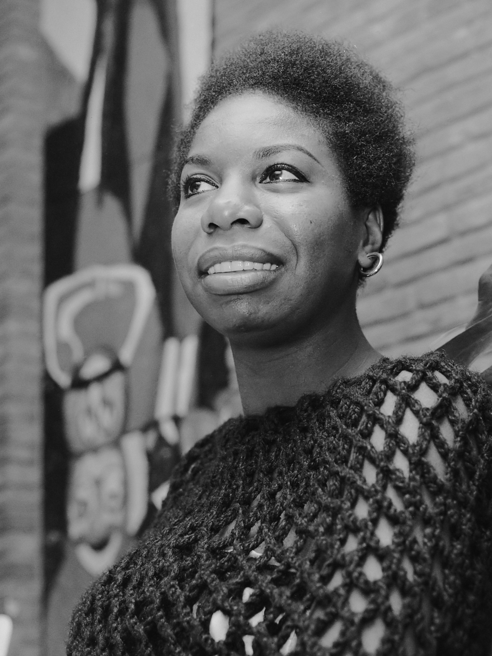 Portret van de Amerikaanse zangeres Nina Simone die met kerst op televisie zal verschijnen 14 december 1965